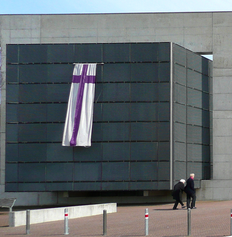 Kirchenfahne der Evangelischen Kirche in Deutschland am Evangelischen Kirchenzentrum Kronsberg